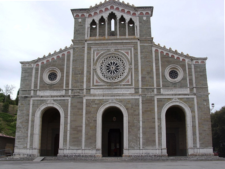 Cortona - Santuario di S. Margherita